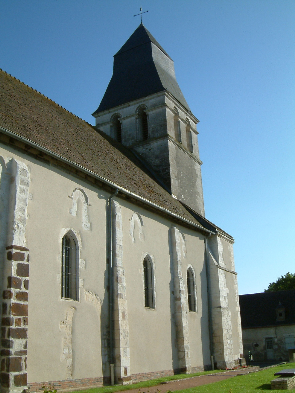 Eglise Saint-Christophe de Rians vue côté nord